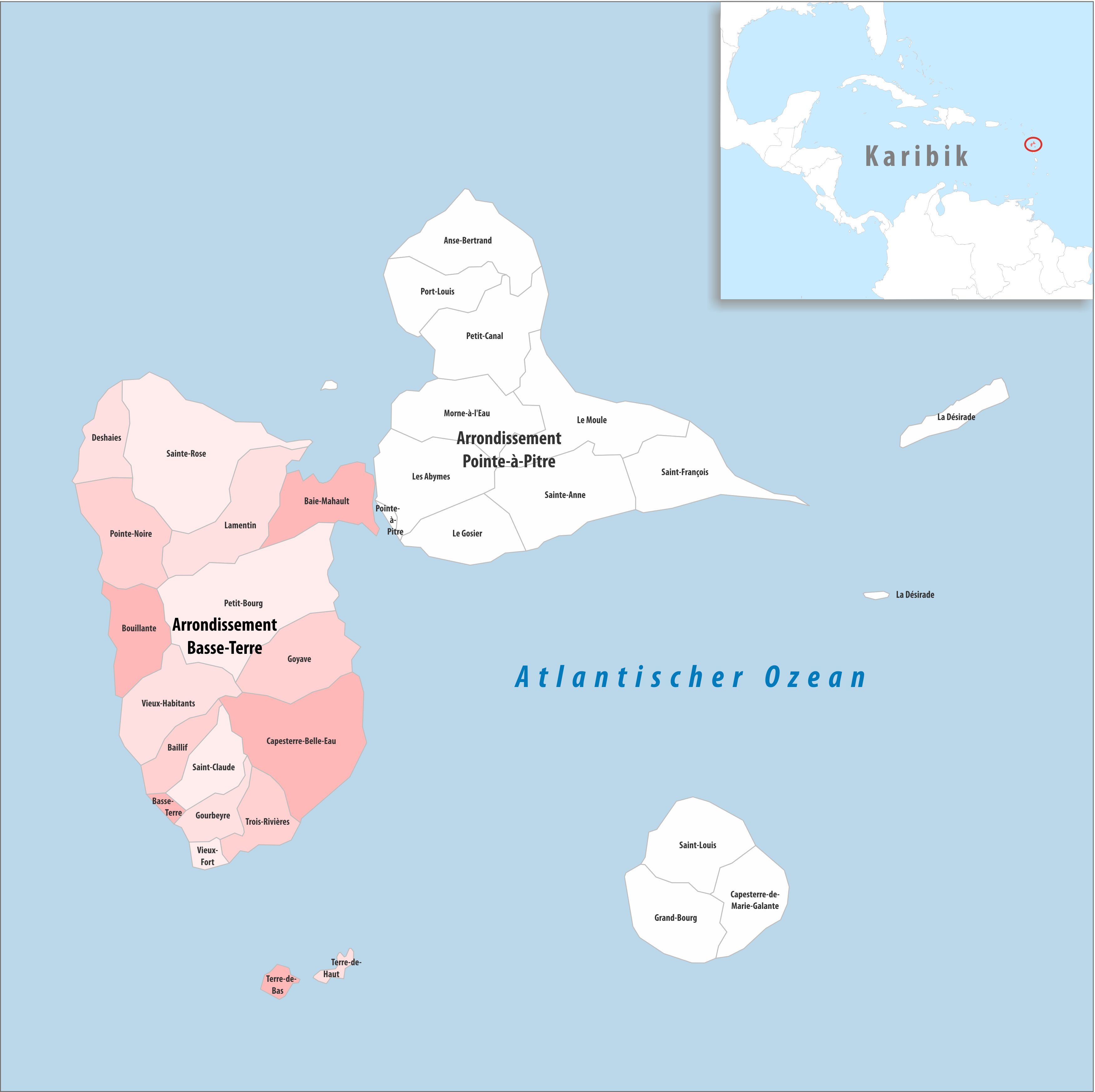 Lage des Arrondissements Basse-Terre